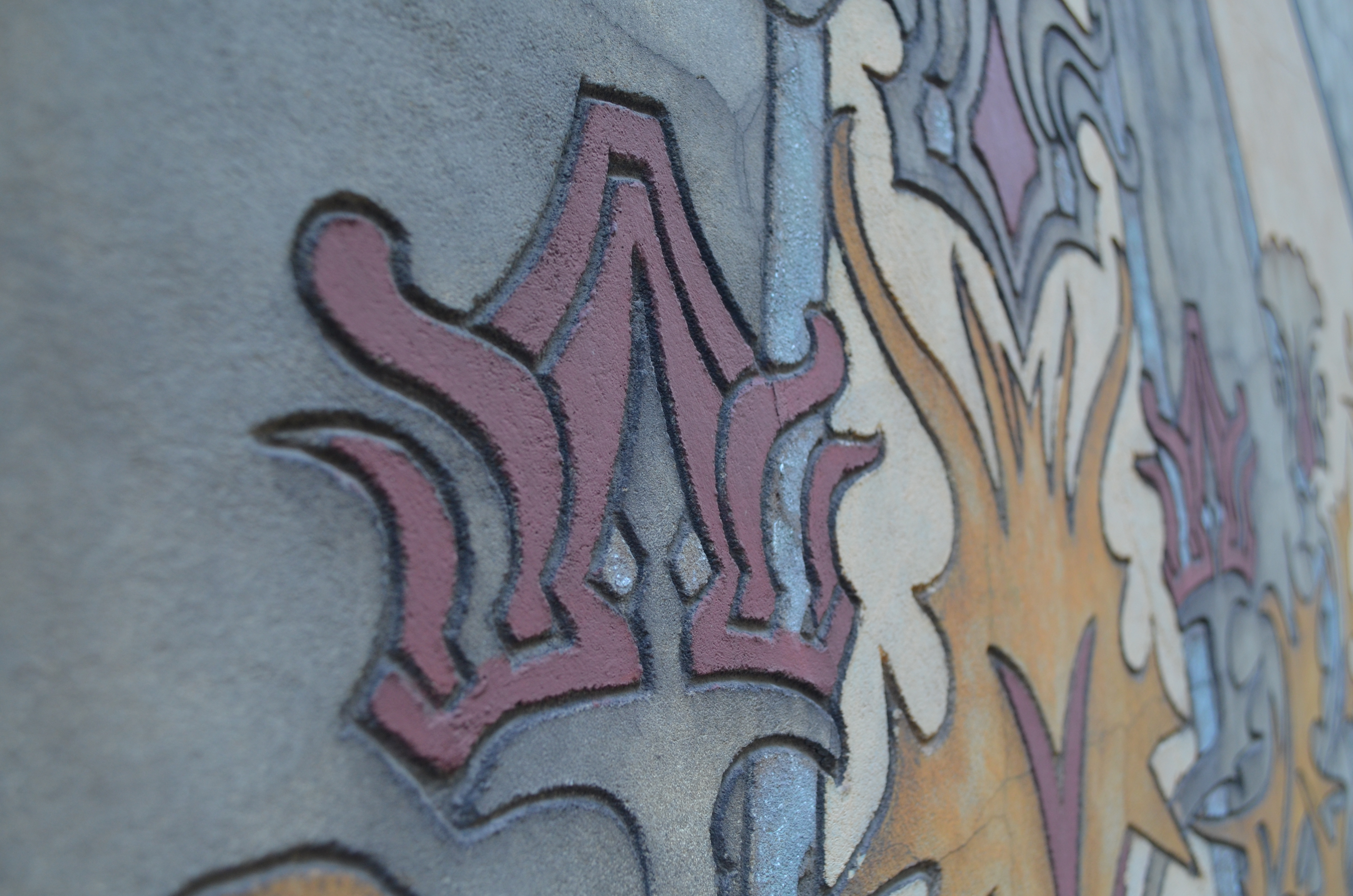 Charleroi (Belgique) - Maison dorée - détail rapproché du sgrafitte de la façade